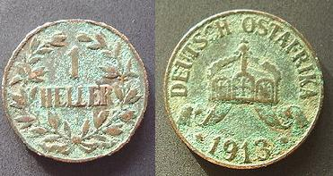 1 Heller Münze aus Deutsch Ostafrika